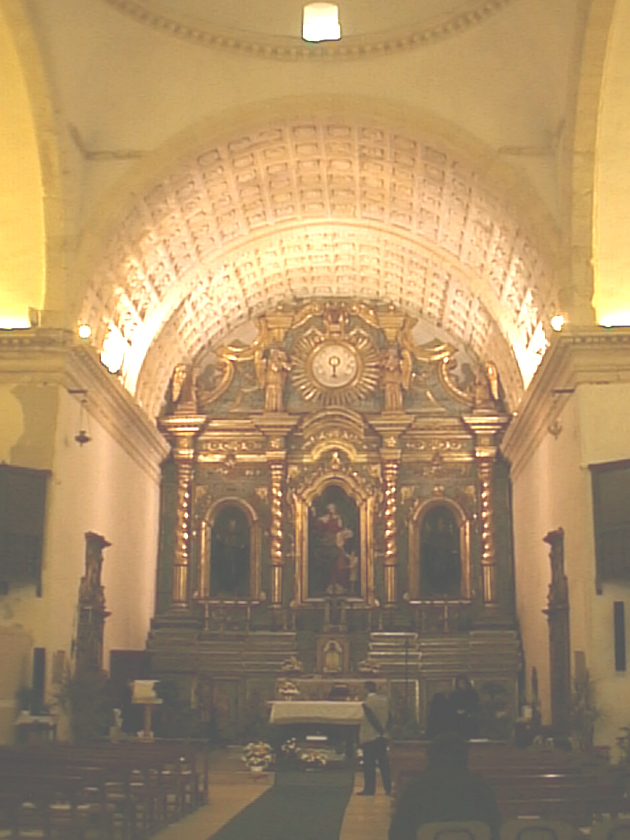 Interno della chiesa di Sant'Agostino (XVI secolo) a Cagliari